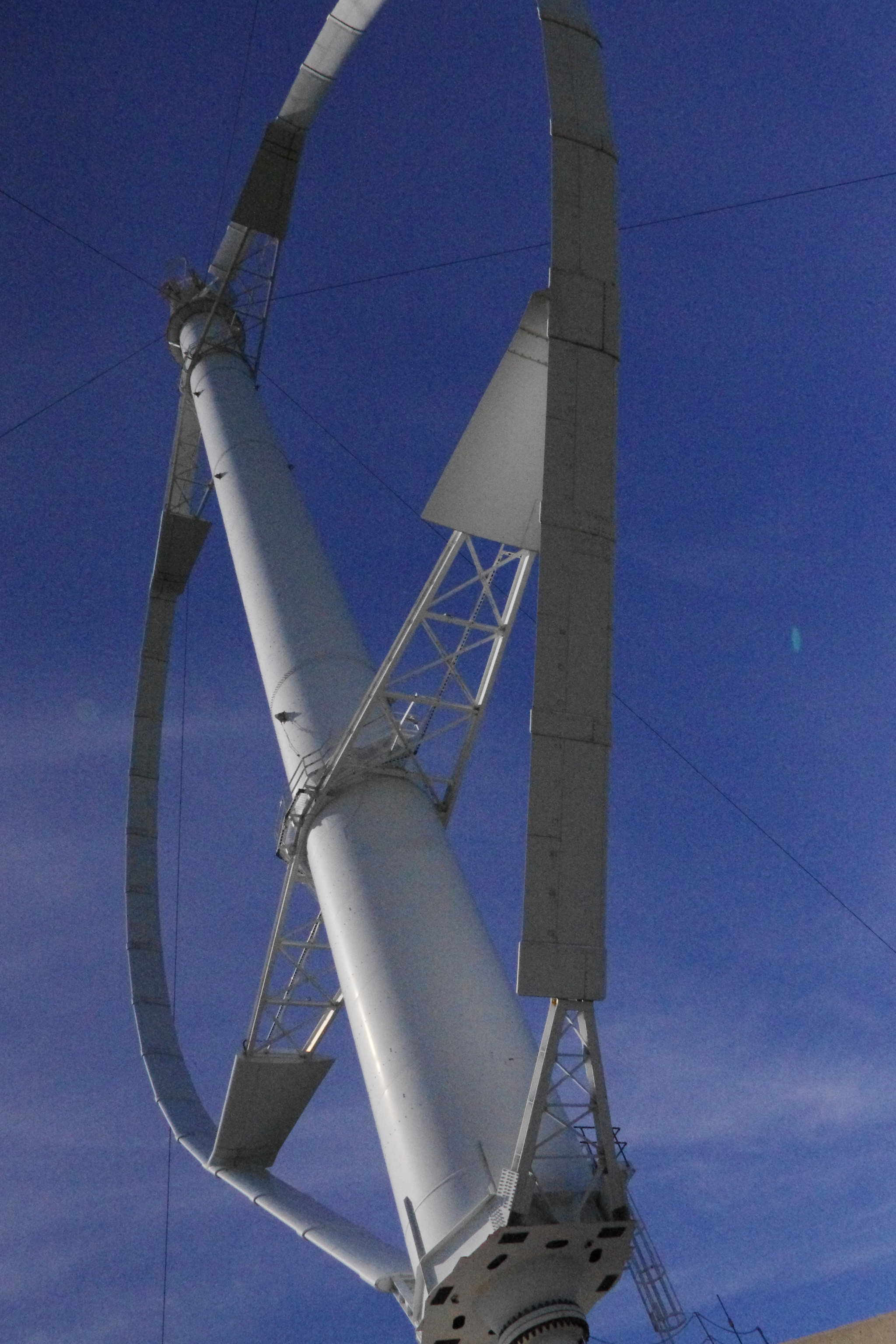 加拿大魁北克cap-chat风车山庄内的垂直轴风车。